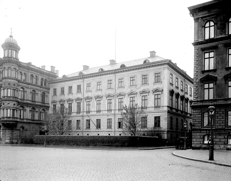 Norska ministerhotellet, Södra Blasieholmshamnen 4. T.v. Bolinderska huset